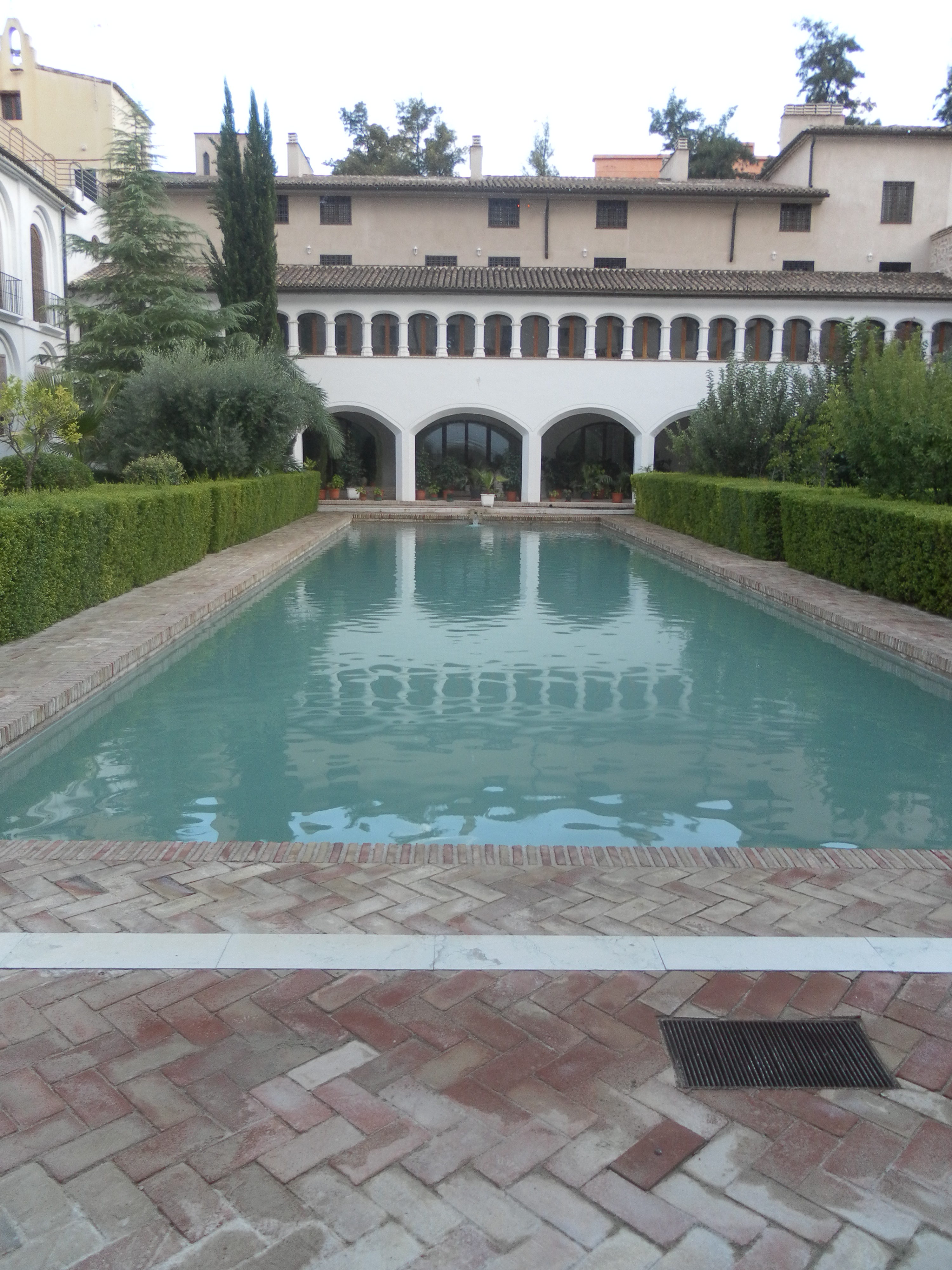 Alberca árabe (siglo XIII), del patio del Alcázar Seguir de Murcia (Región de Murcia, España). Museo de Santa Clara.